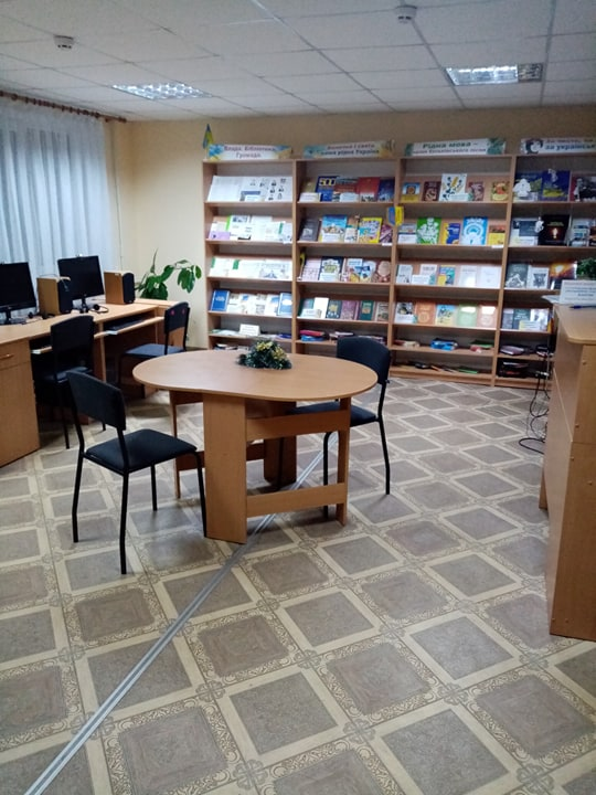 У читальному залі бібліотеки-філії №7 Хмельницької міської ЦБС проходять масові заходи для користувачів, а також заняття клубів та гуртків.